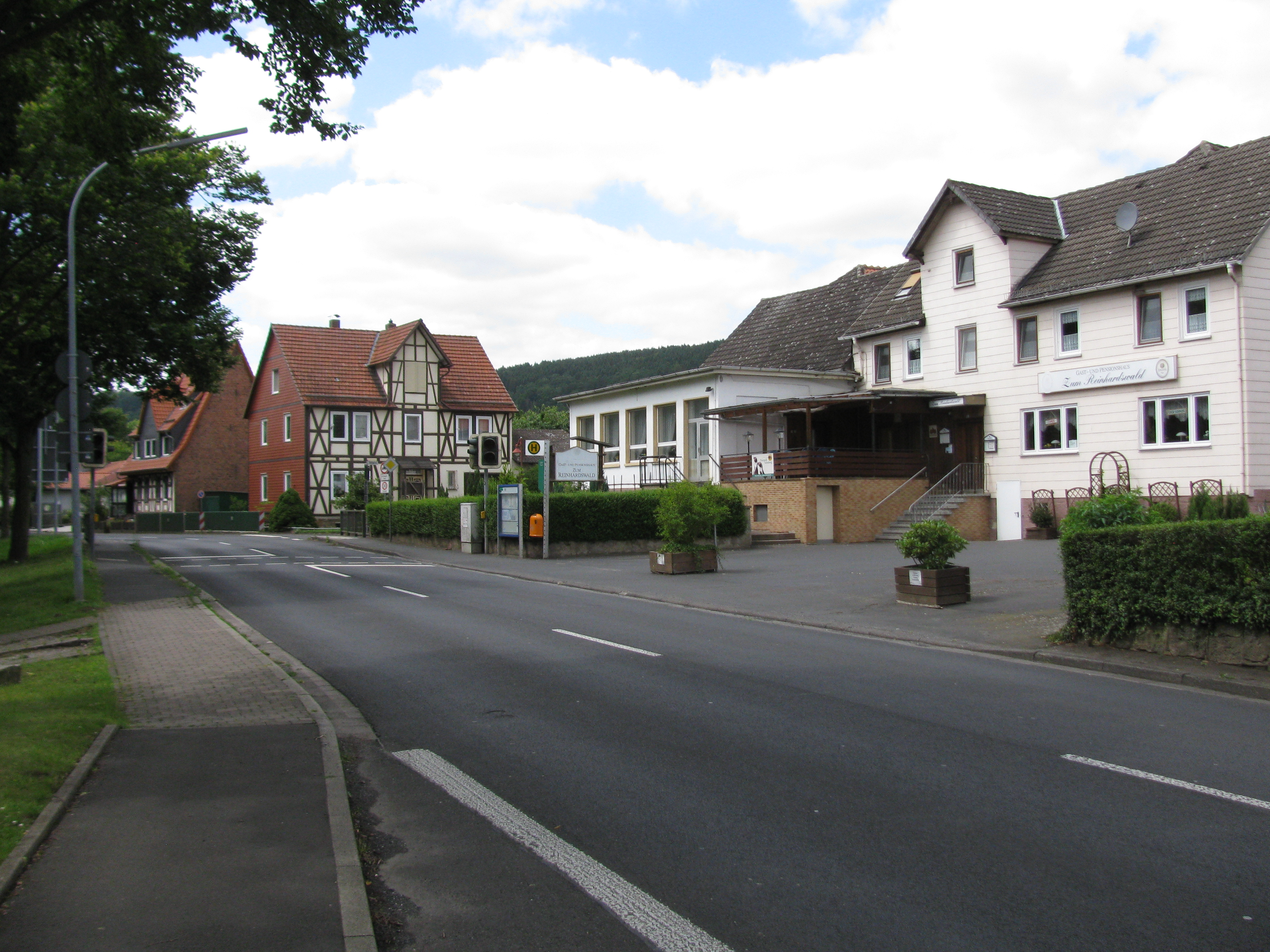 die Bushaltestelle B3 in Fahrtrichtung Kassel in Fuldatal-Wilhelmshausen